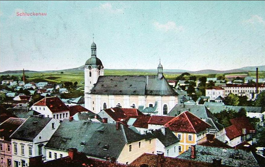 Šluknov, kostel svatého Václava, dobová pohlednice.